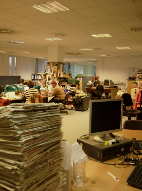 A Blikk egykori szerkesztőségi helyisége a Szugló utcában